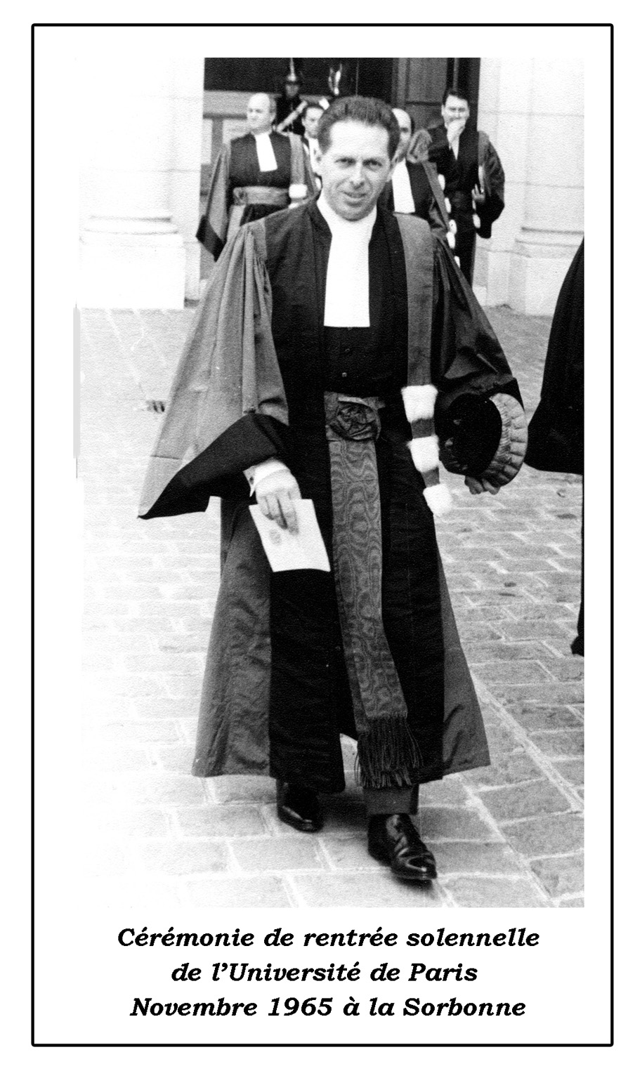 Cérémonie de rentrée solennelle de l'Université de Paris - Novembre 1965 à la Sorbonne